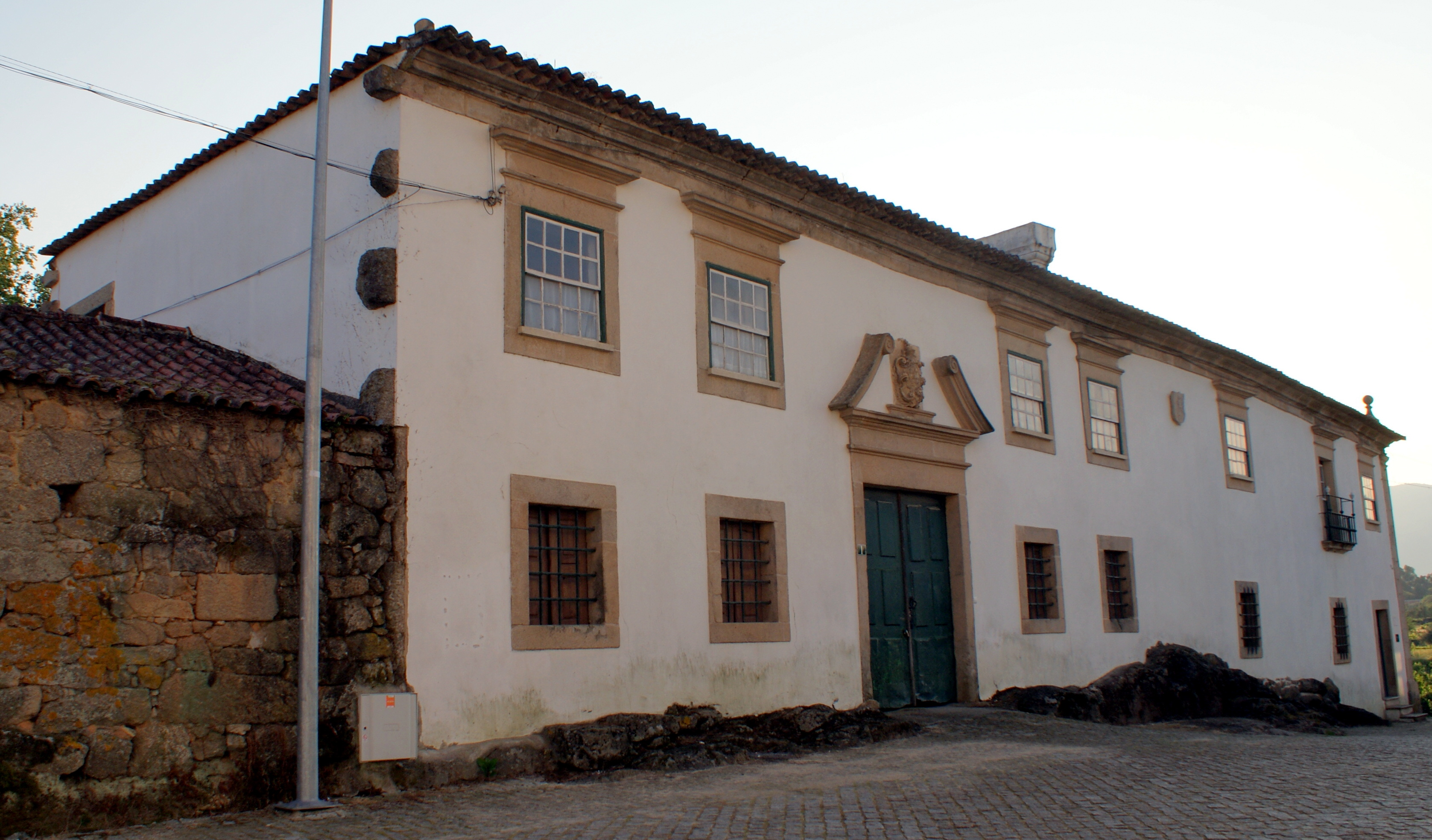 Fachada Paço de Molelos